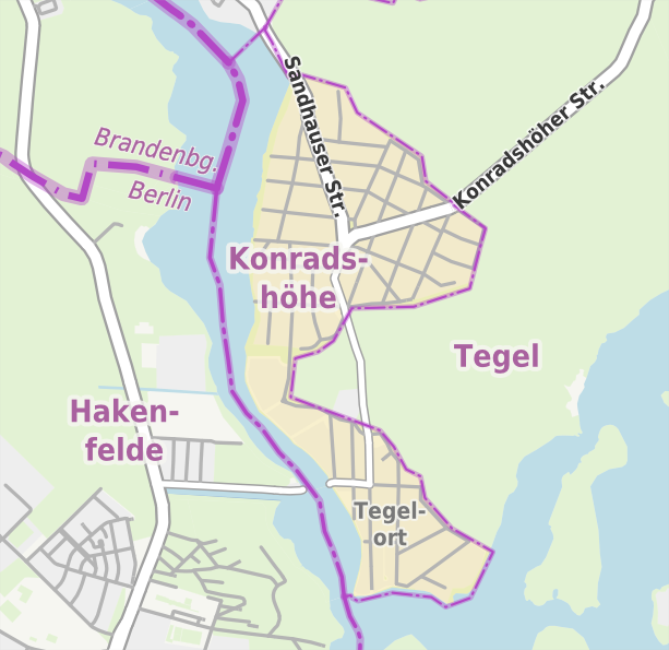 Übersichtskarte der Straßen und Ortslagen in Berlin-Konradshöhe